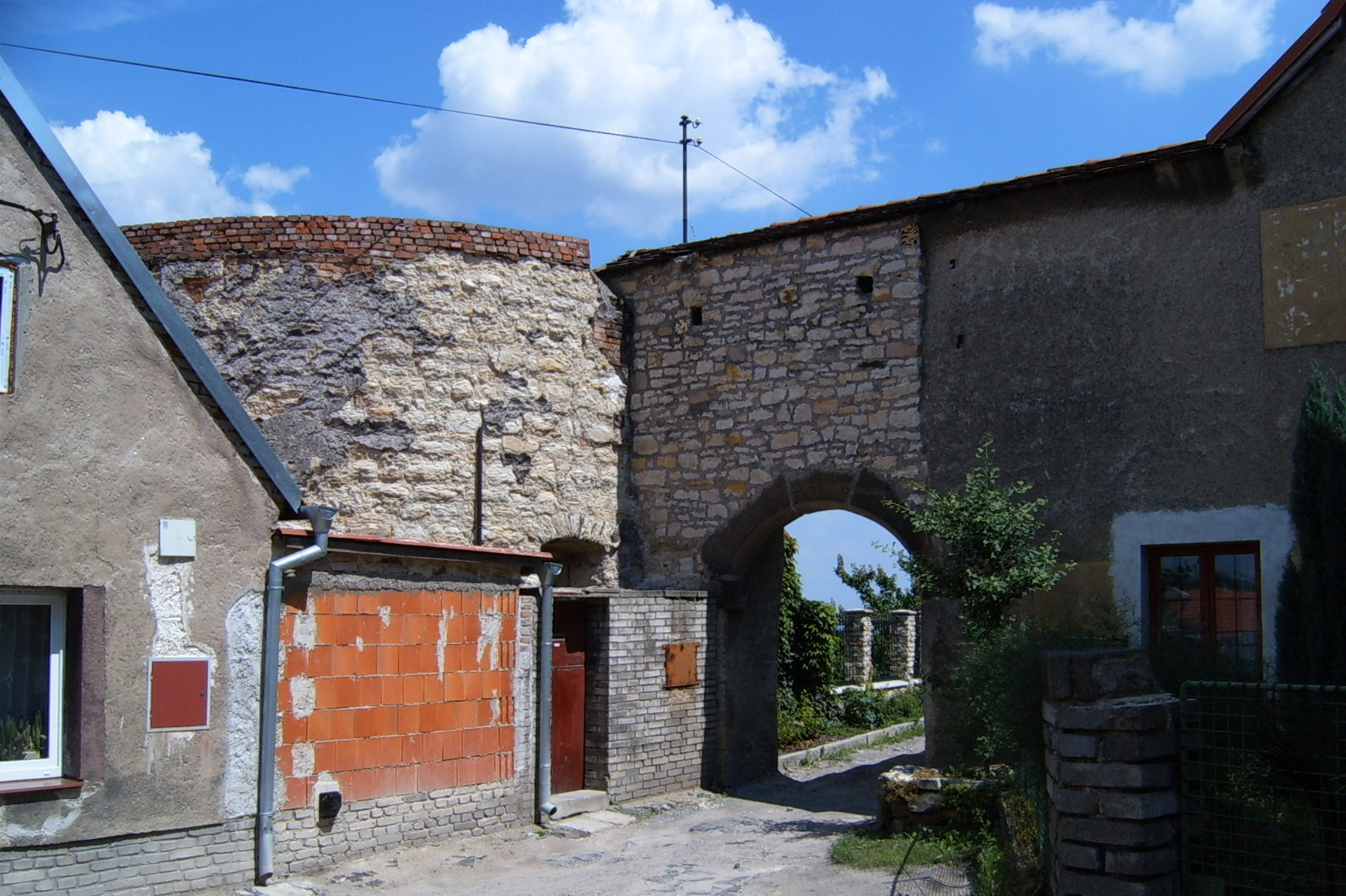 Brána v jihozápadním nároží s baštou u domu Starý hrad 11/2.